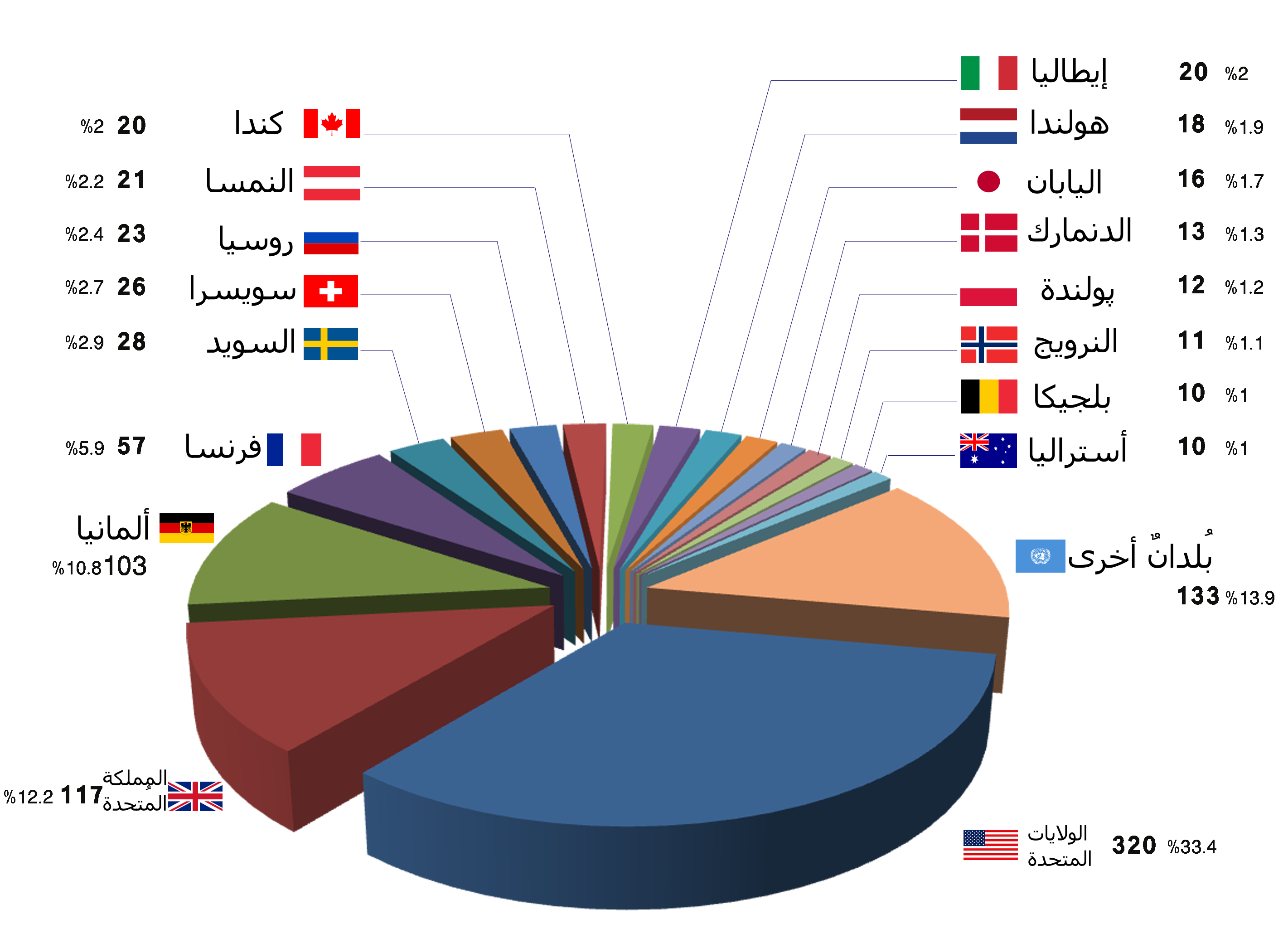 توزيع جوائز نوبل بِحسب البلد. العدد يُمثِّلُ إجمالي عدد الجوائز التي فاز بها هذا البلد دون غيره. أمَّا النسبة فتُمثل إجمالي تلك الجوائز من بين جميع الجوائز التي فازت بها كُل البُلدان. لم تُعتمد الجوائز التي مُنحت إلى المُنظمات الدوليَّة. احتُسبت جميع الإحصاءات حتَّى سنة 2010م مُتضمنةً إيَّاها كذلك. نظرًا لأنَّ بعض الأشخاص قد يحملون جنسيَّة أكثر من دولة أو يفوزون بجائزةٍ باسم أكثر من دولة، فإنَّ الأرقام قد تتقاطع أو تتضارب في بعض الأحيان، وبالتالي فإنَّ النتيجة النهائيَّة قد لا تكون دقيقة.